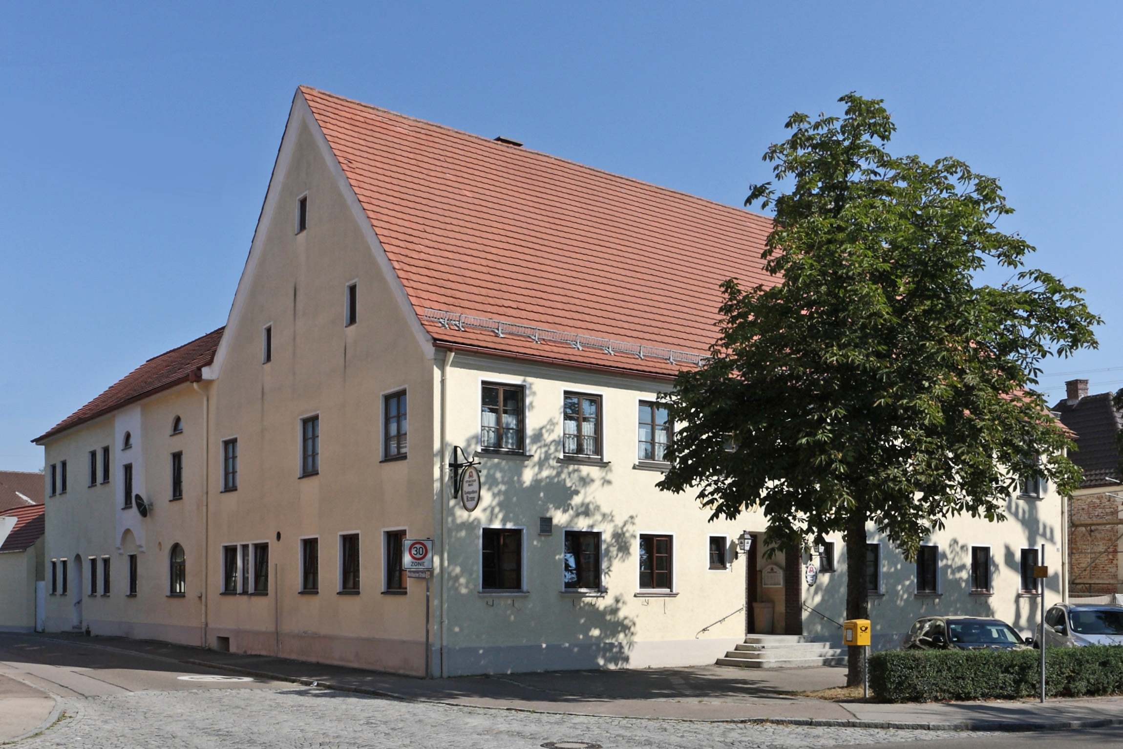 Gasthof "Zur Krone", Hauptstr. 23 (18. Jh.)